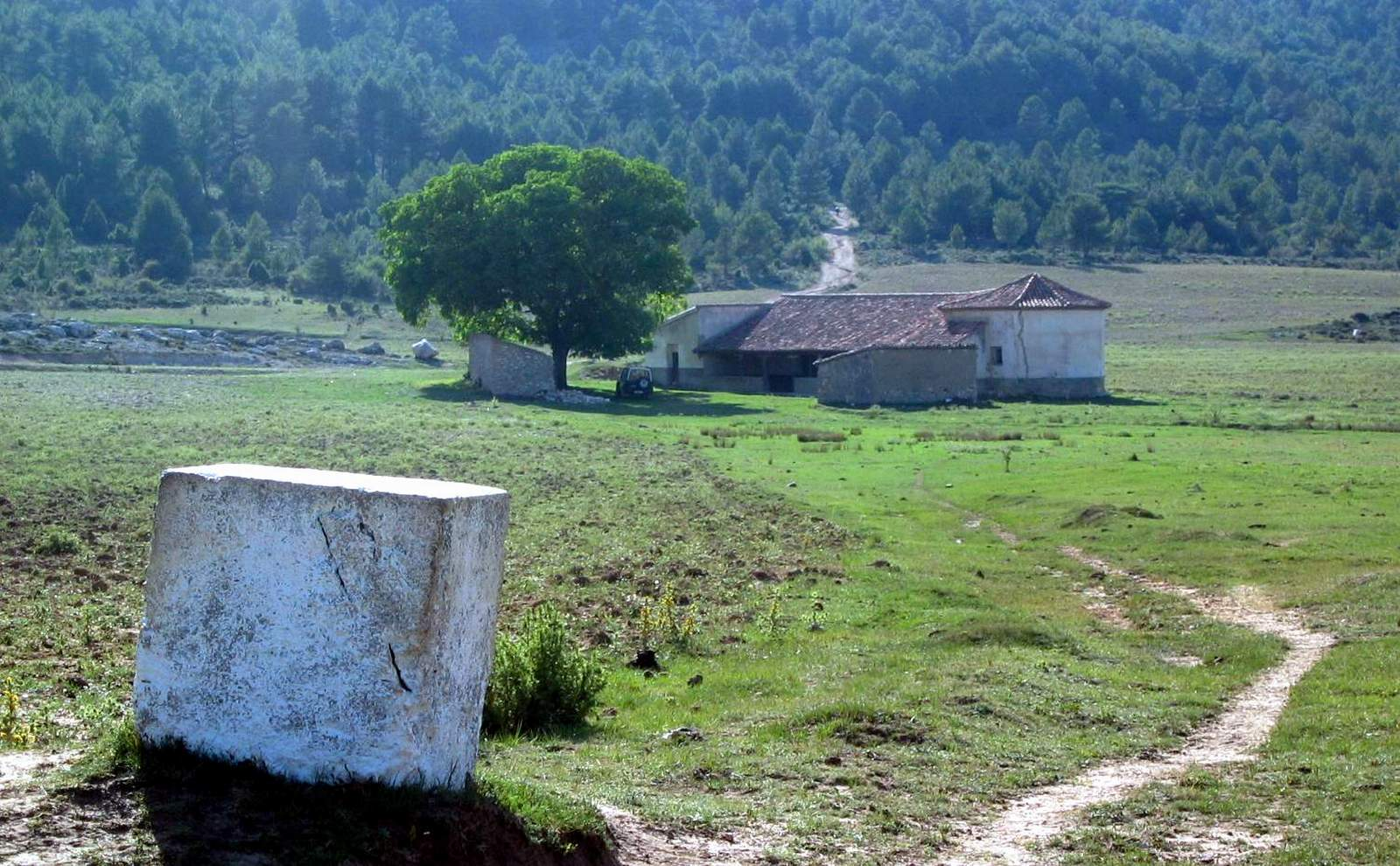 Vista general (meridional) de la ermita de Santerón, Algarra (Cuenca), desde la "Mesa de la Virgen", año 2006.